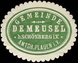 Sealing stamp Title: Gemeinde Demeusel bei Schönberg im Vogtland - Amtshauptmannschaft Plauen Description: grün, weiß, geprägt Place: Demeusel size: 3x4 cm